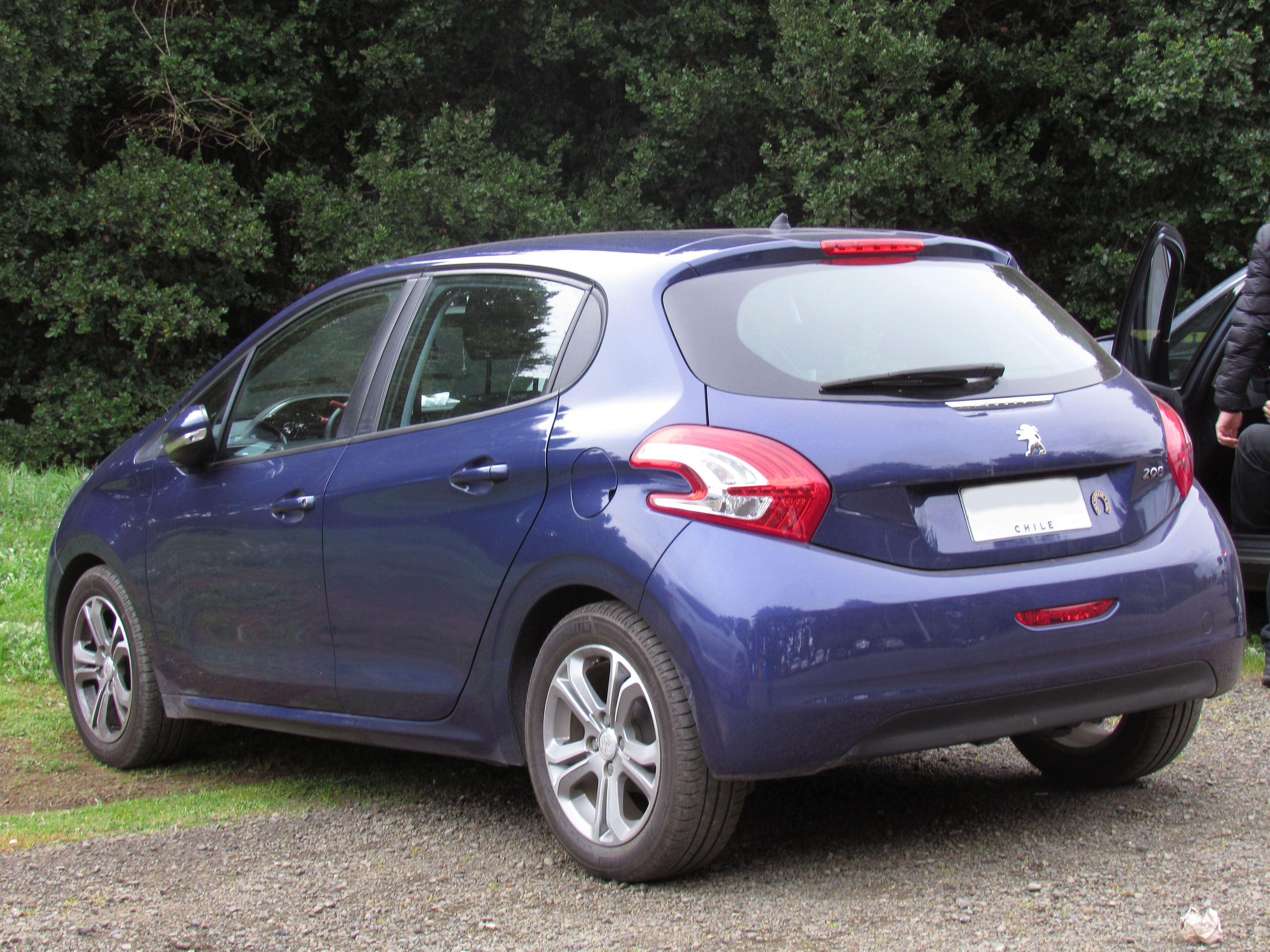 Peugeot 208 1.2 VTi Active 2013